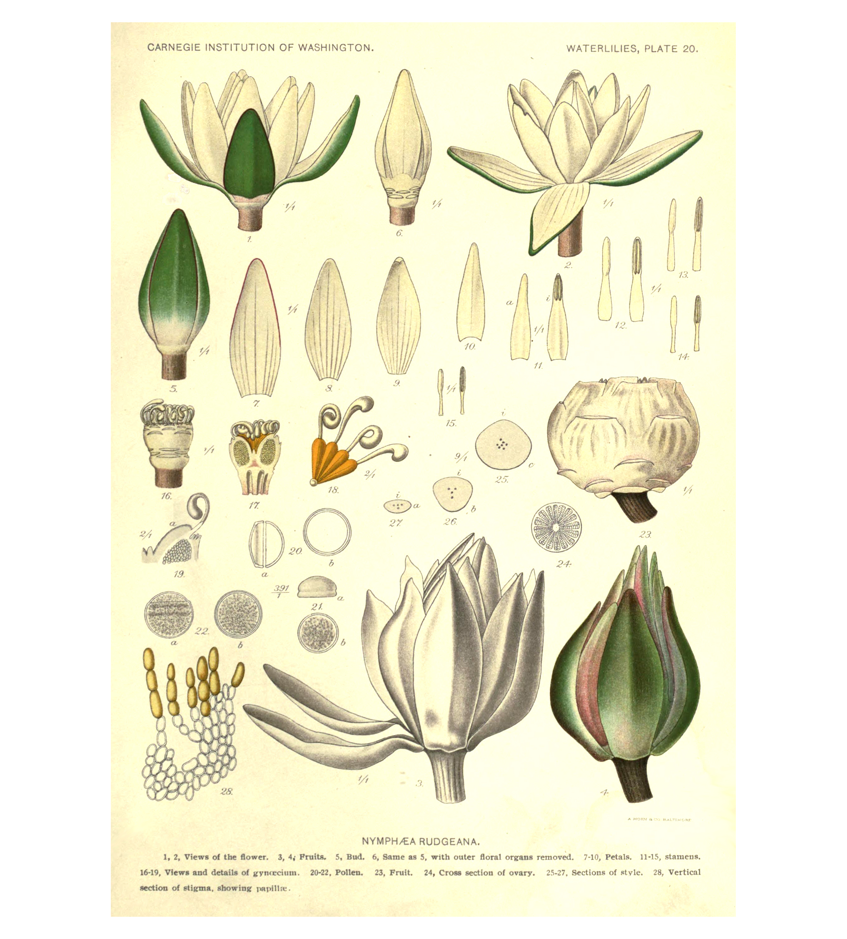 Botanische Abbildung einer Nymphaea-Art